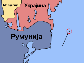 Локација Змијског острва